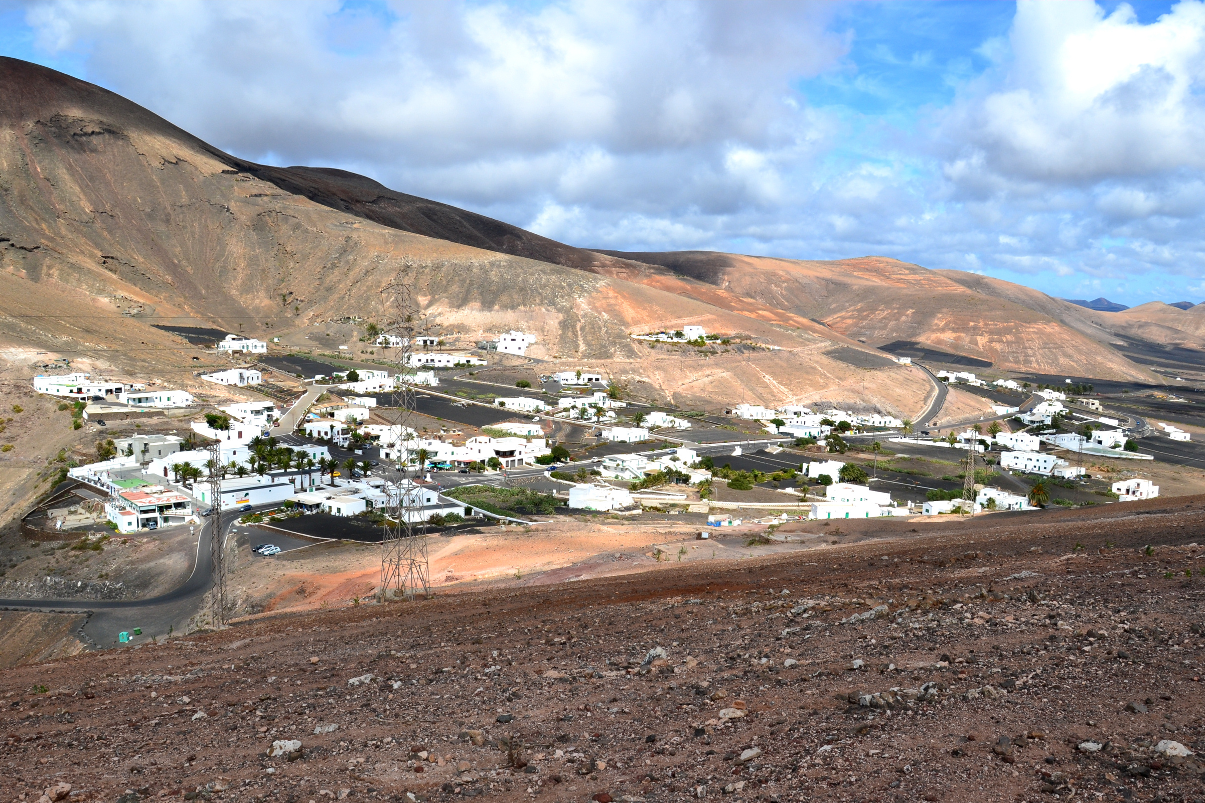 Femés, Ort auf der Kanareninsel Lanzarote, Spanien